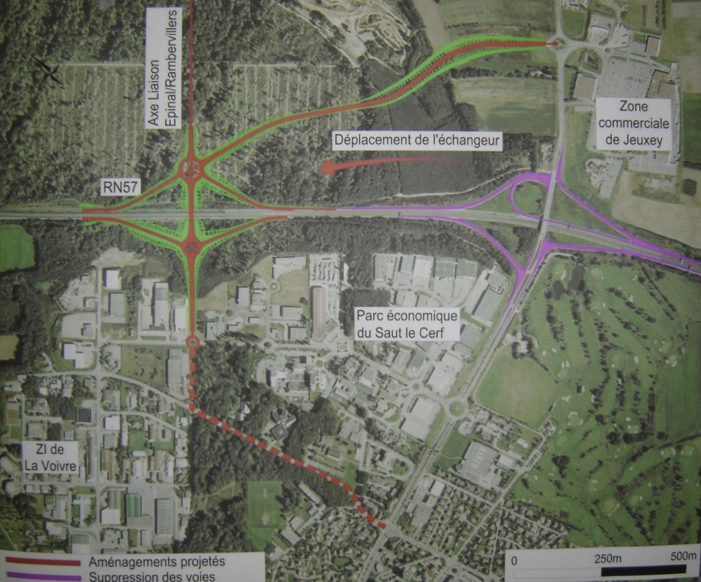 Le futur échangeur de La Voivre.